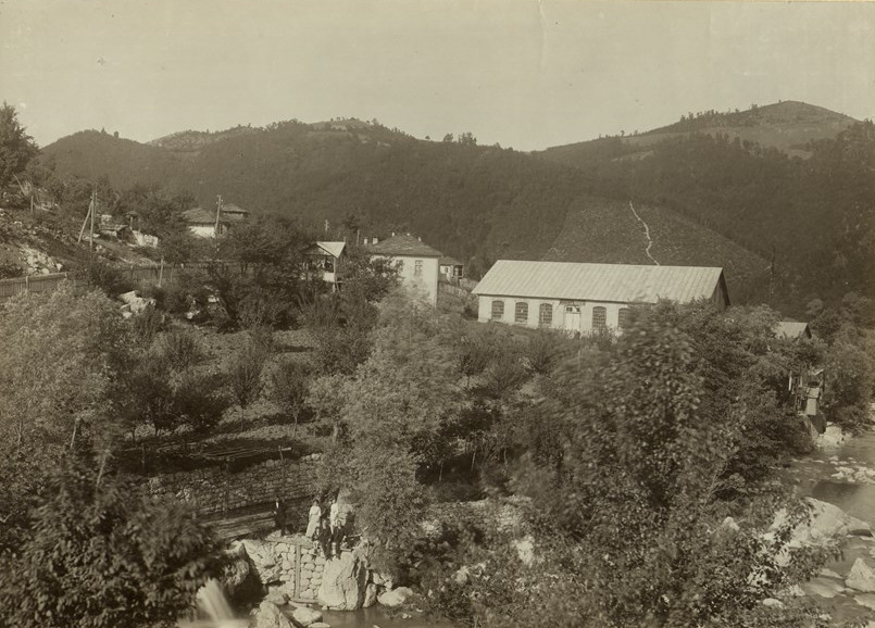 Фабрика за вълнени прежди на Ганчо Д. Попов в Габрово. Фотоалбум с фотографии на български индустриални предприятия от периода 1887-1912 г., подарен от Съюза на българските индустриалци на цар Фердинанд І по случай 25-годишнината от възшествието му на българския престол.